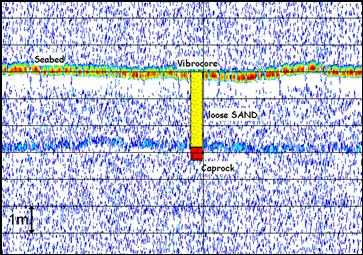 Zelf gemaakt